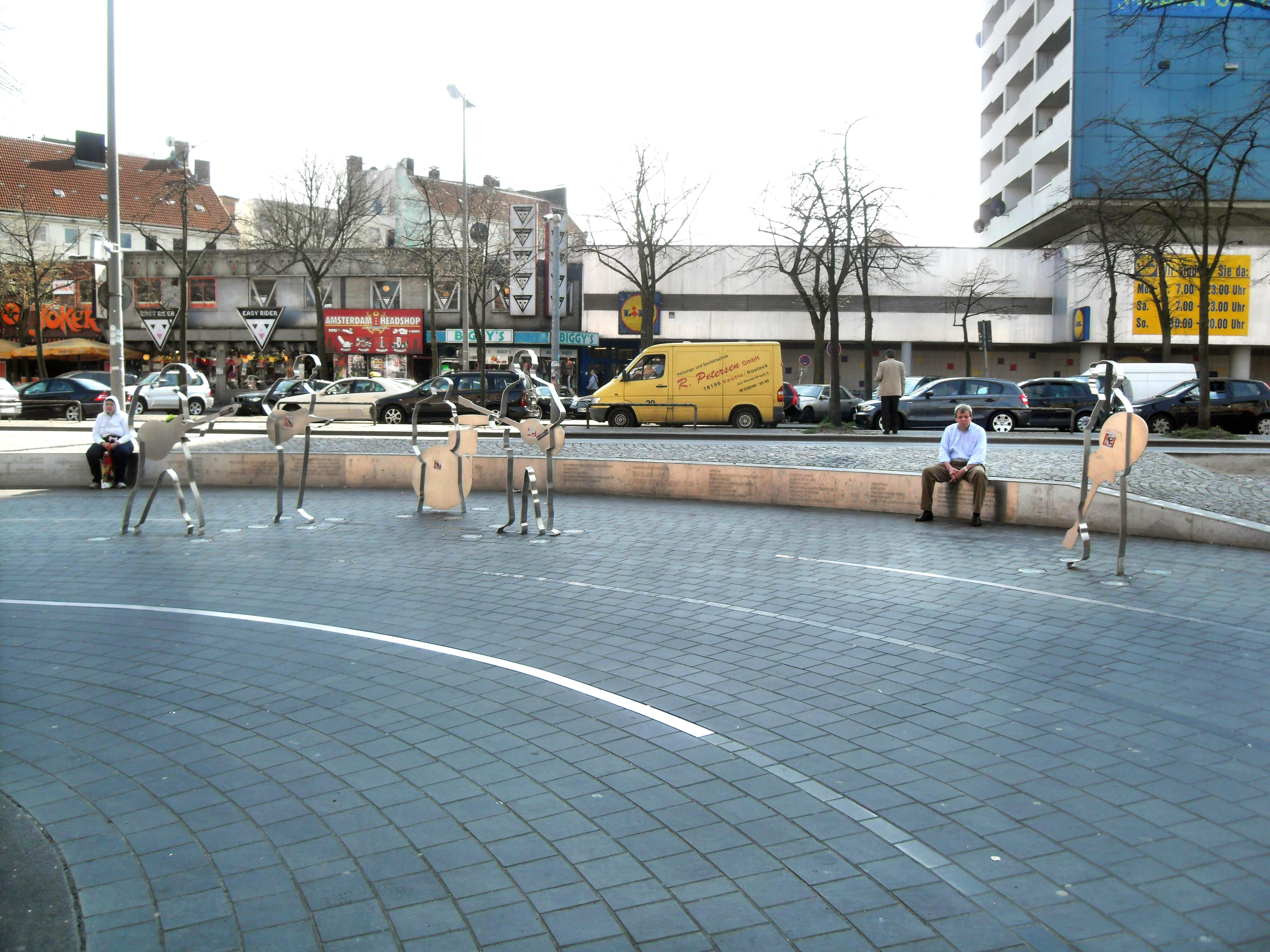 Die fünf Figuren auf dem Beatles-Platz in Hamburg-St. Pauli in Deutschland